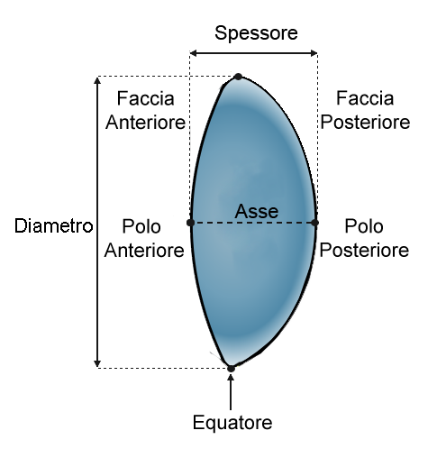 Schema della topografia del cristallino